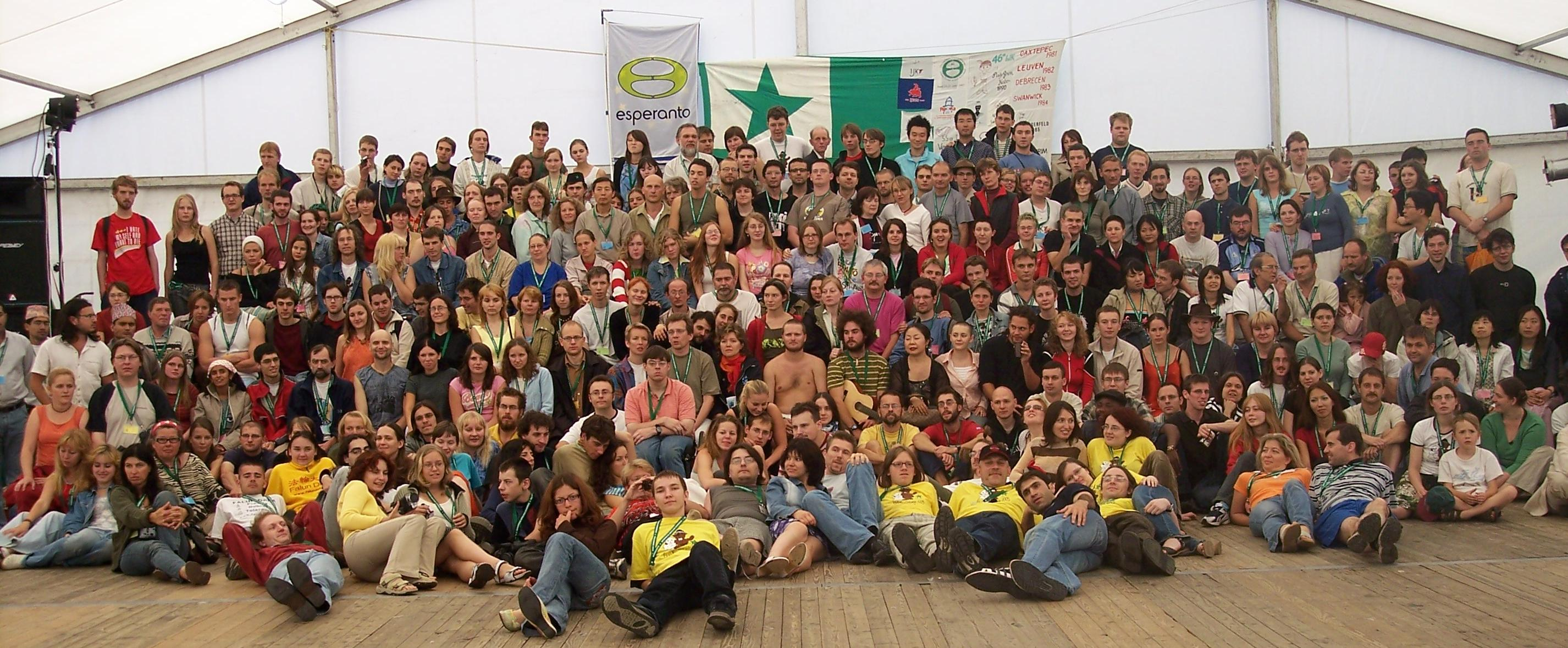 Grupa foto de Internacia junulara kongreso 2005 en Zakopane, Pollando.